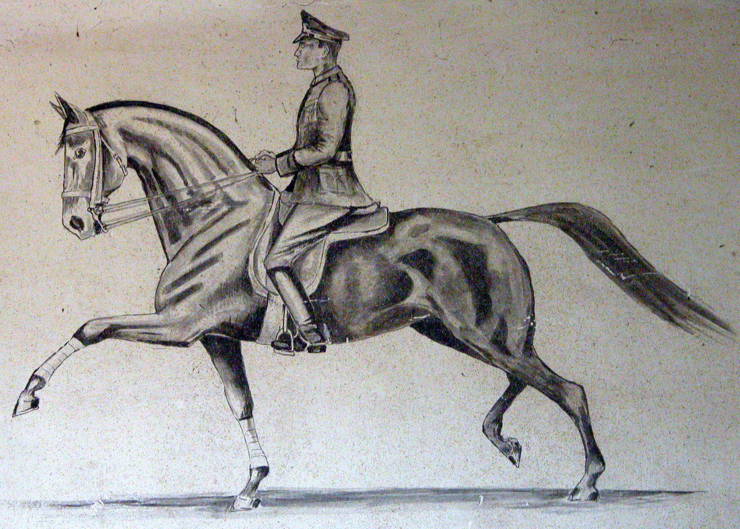 Braunschweig: Wandmalerei eines Unbekannten in einem Stall des ehemaligen Braunschweiger Landgestüts, Leonhardplatz 1. Dargestellt ein Angehöriger der Reiterstaffel der Braunschweiger Polizei.